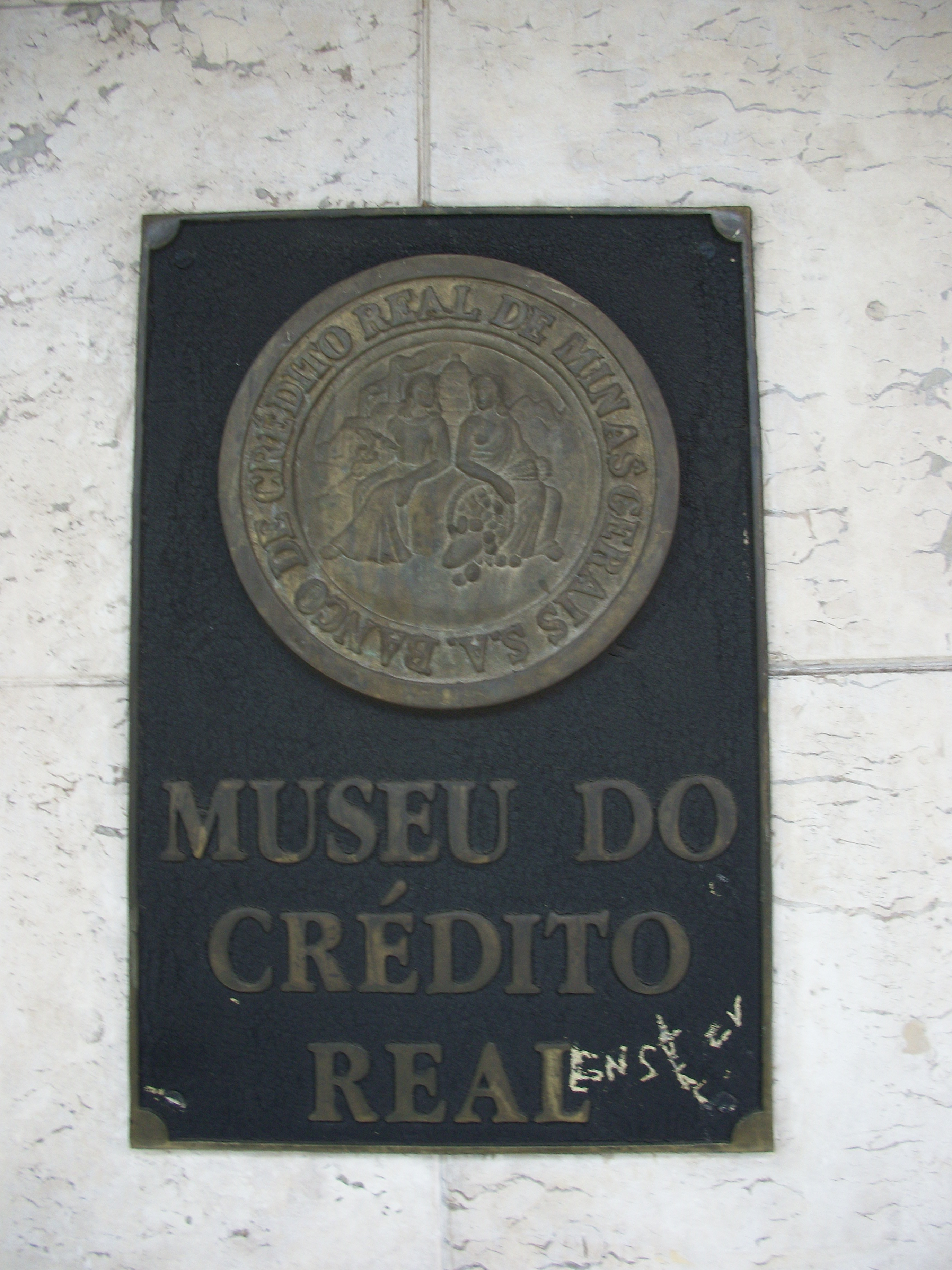 Placa do Museu do Crédito Real, próximo à porta deste.